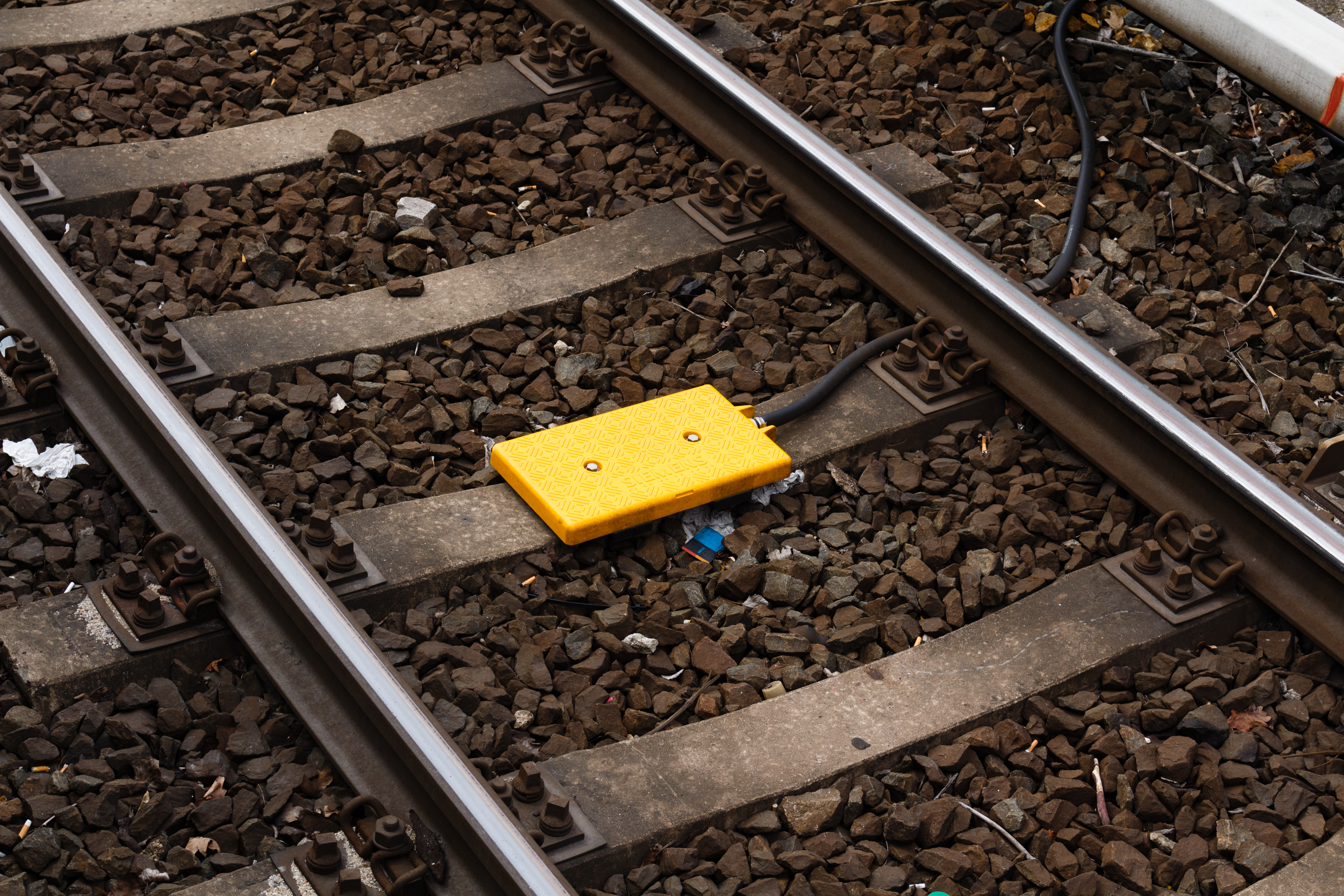 ZBS-Balise der S-Bahn Berlin